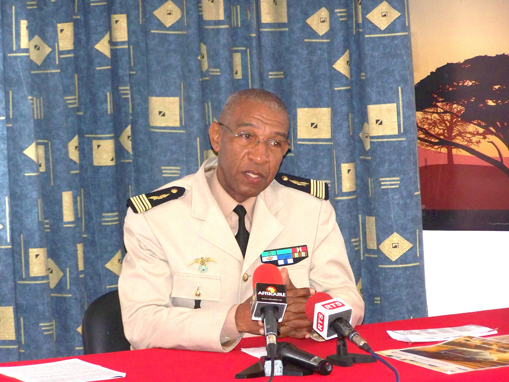 Le chef d'état major de l'armée de l'air au Sénégal